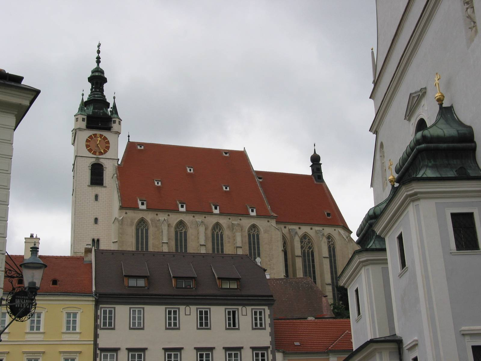 de: Piaristenkirche in Krems en: Church of the piarists in Krems